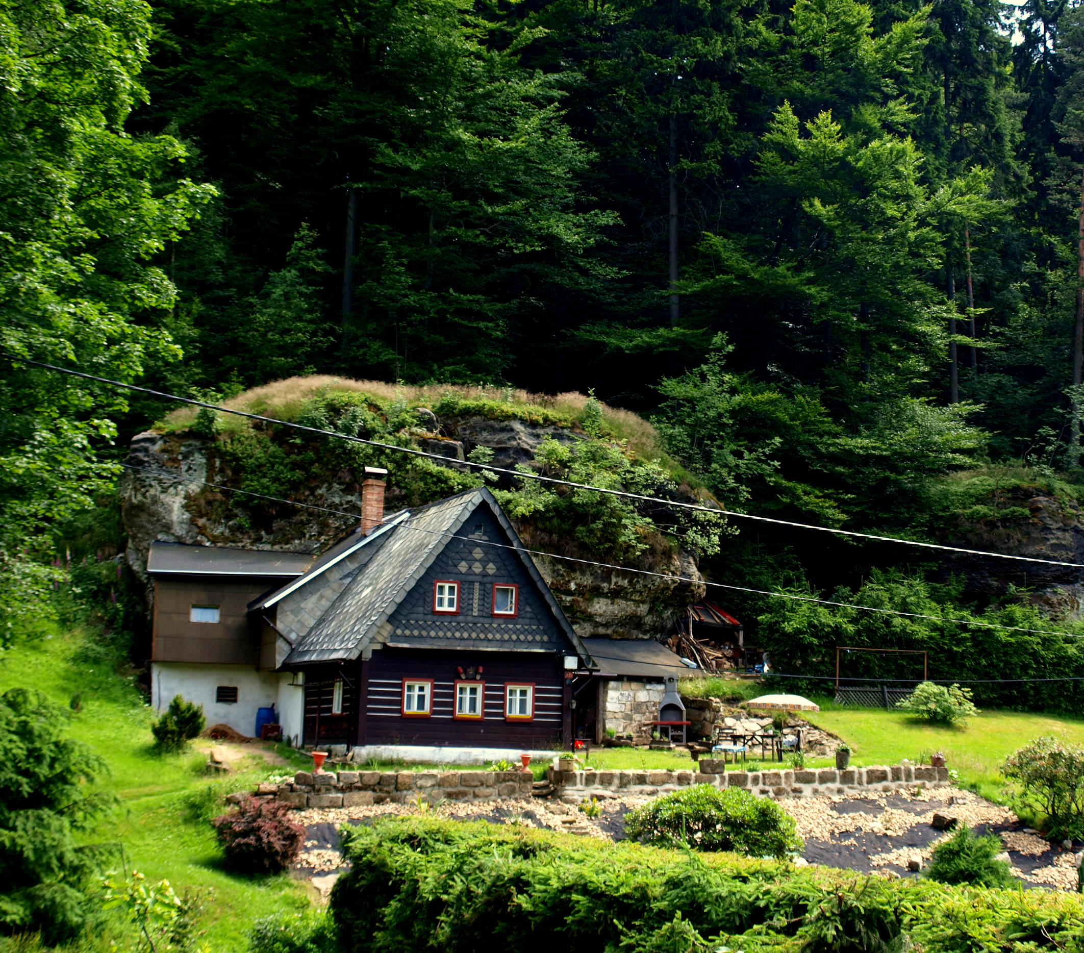 Krompach